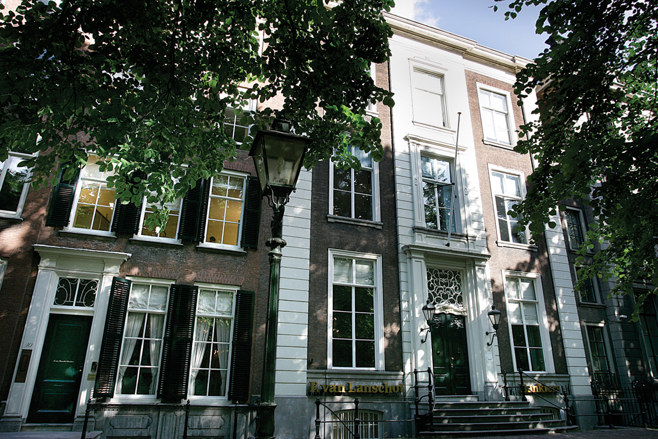 Van Lanschot Bankiers, kantoor Den Haag, Lange Voorhout 30-32